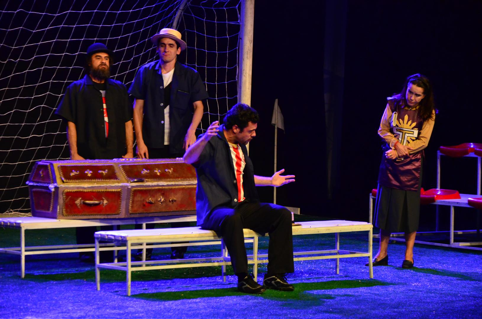 Representación de la obra «A falecida» de Nelson Rodrigues el 25 de agosto de 2013